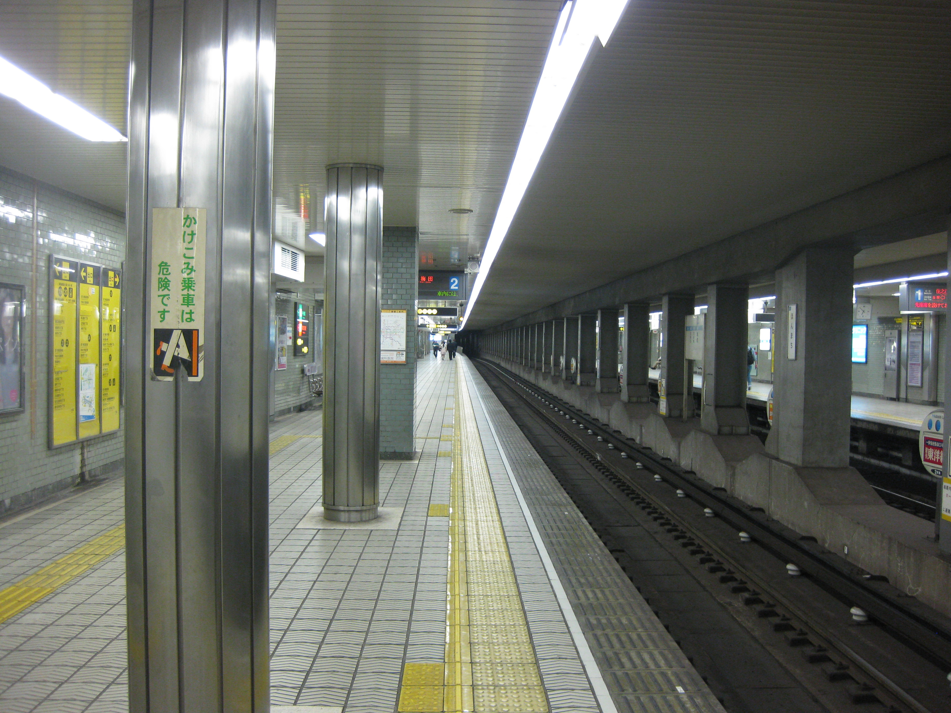 大阪市営地下鉄四つ橋線本町駅プラットホーム